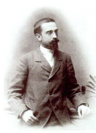 Retrat del poeta Joan Maragall i Gorina (1860-1911), cap al 1885.